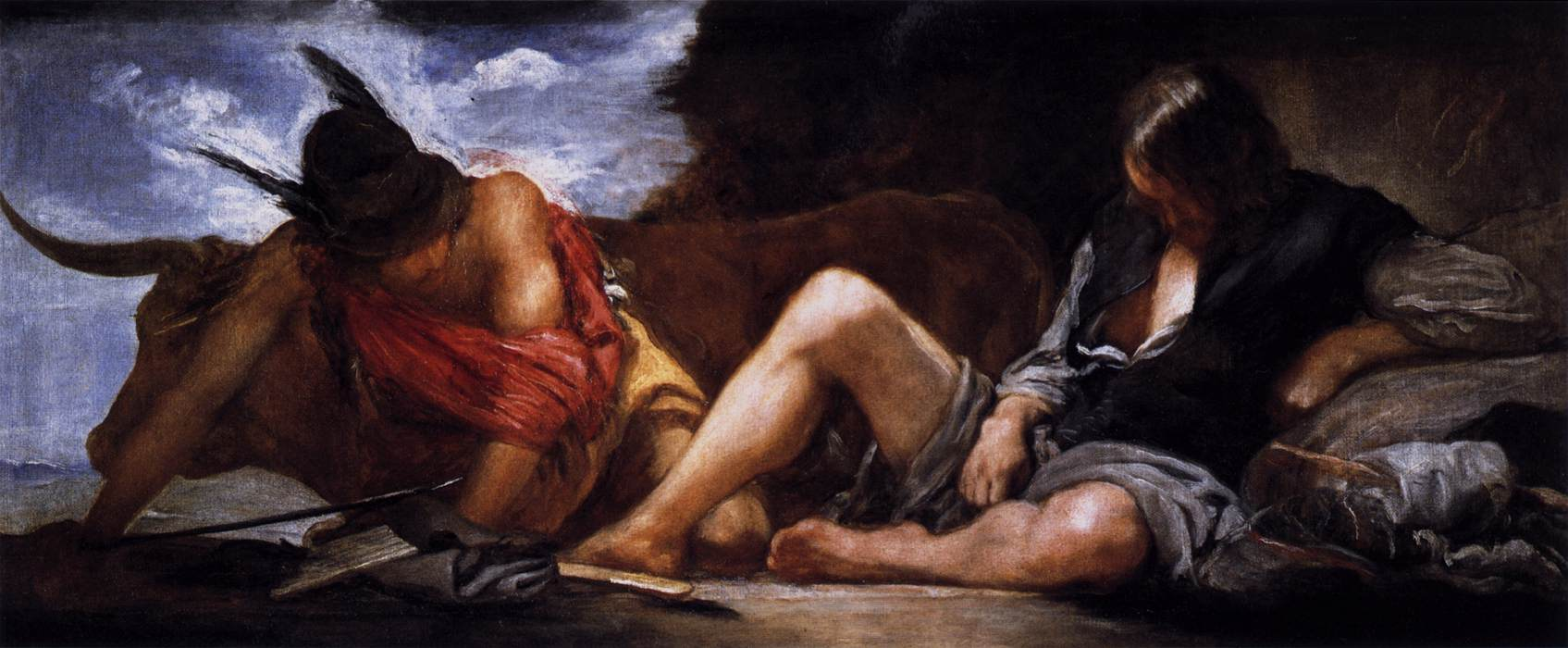 La obra representa al dios Mercurio junto a Argos, y es una de las obras de temática mitológica de Diego Velázquez conservadas en el Museo del Prado.